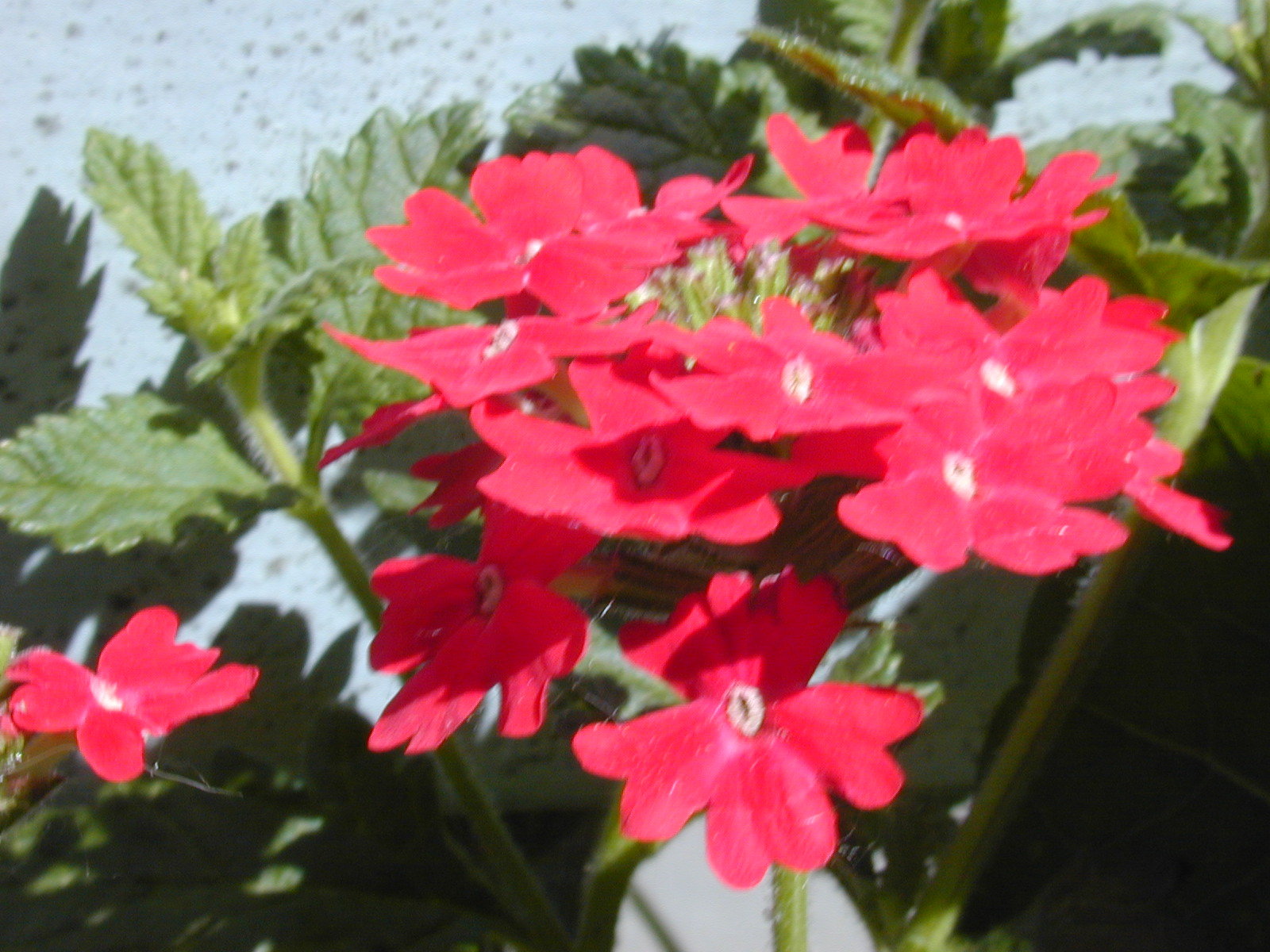 Glandularia peruviana (syn. Verbena peruviana)